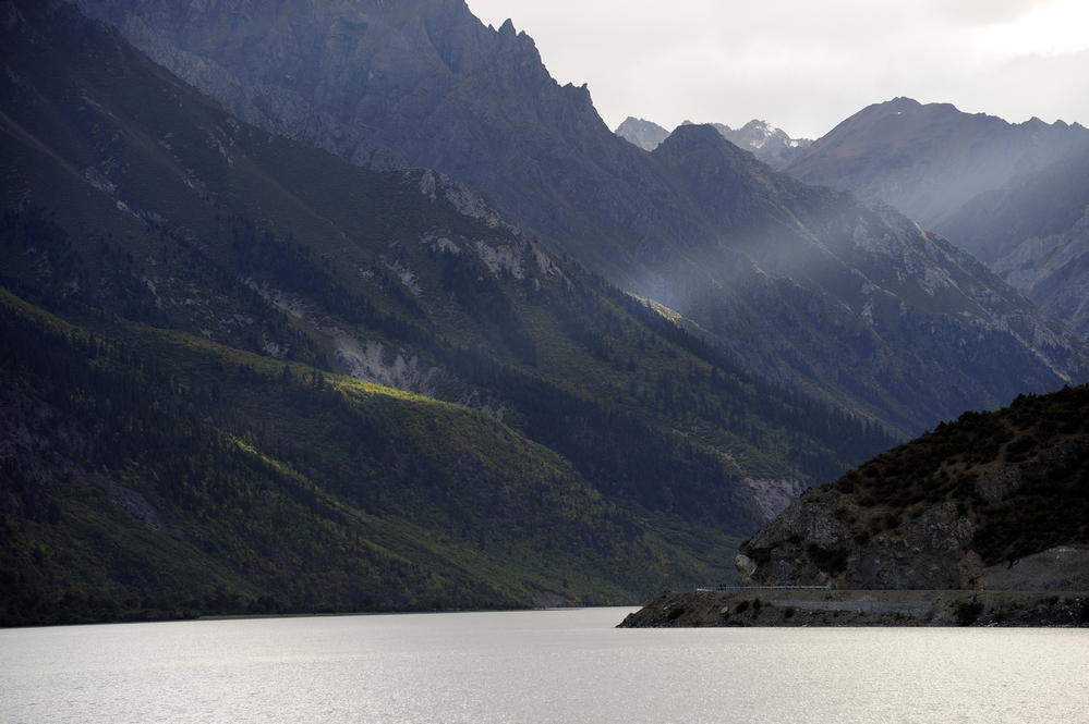 Rawok tso